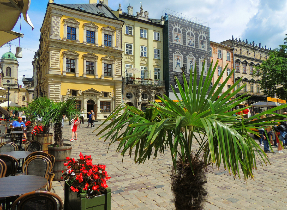 Площа Ринок у Львові